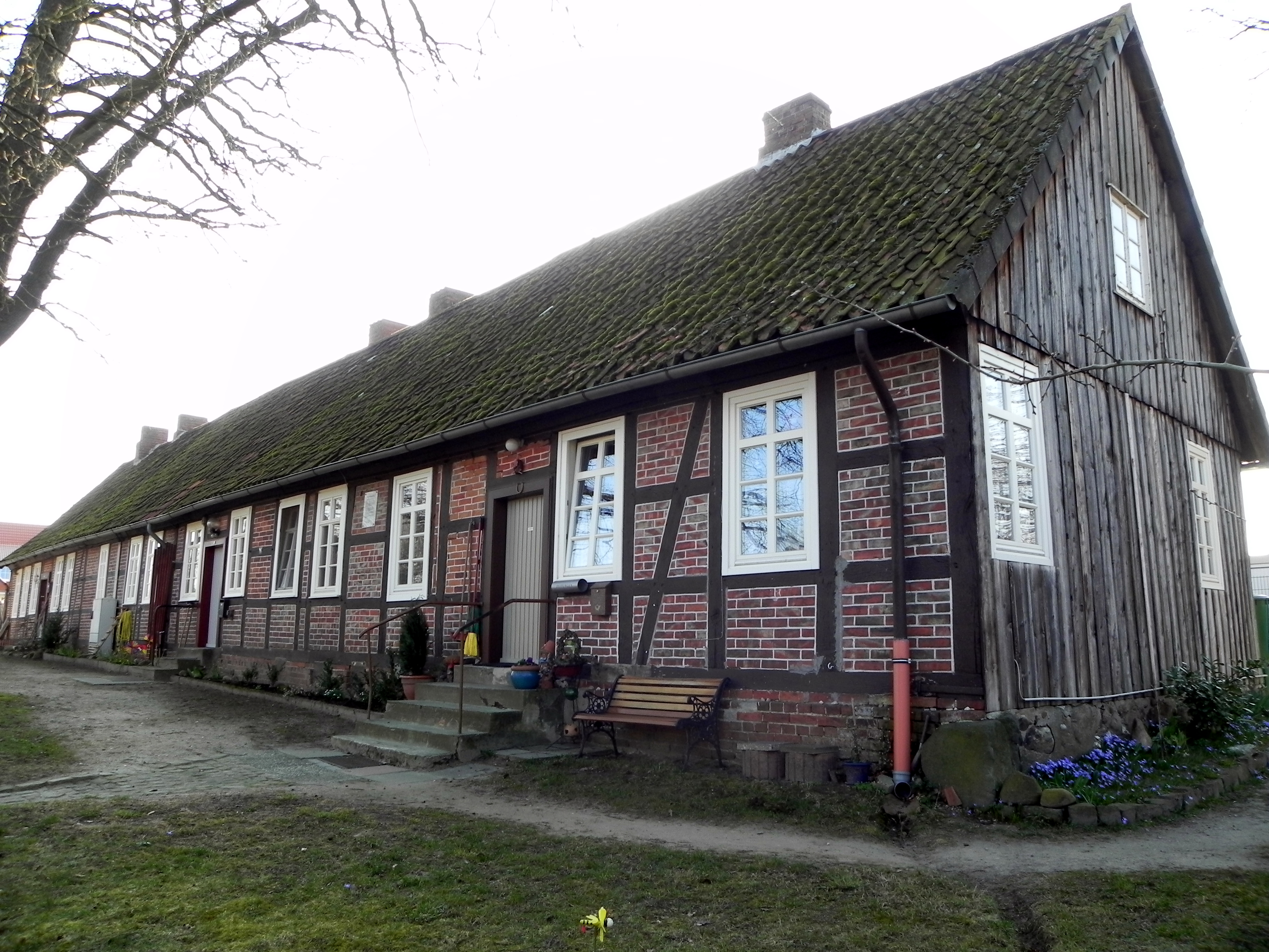 1810 für die Offiziere der französischen Besatzungsmacht gebautes Haus, als "Franzosenkaserne" bezeichnet, in Bergen (Celle); Niedersachsen, Germany